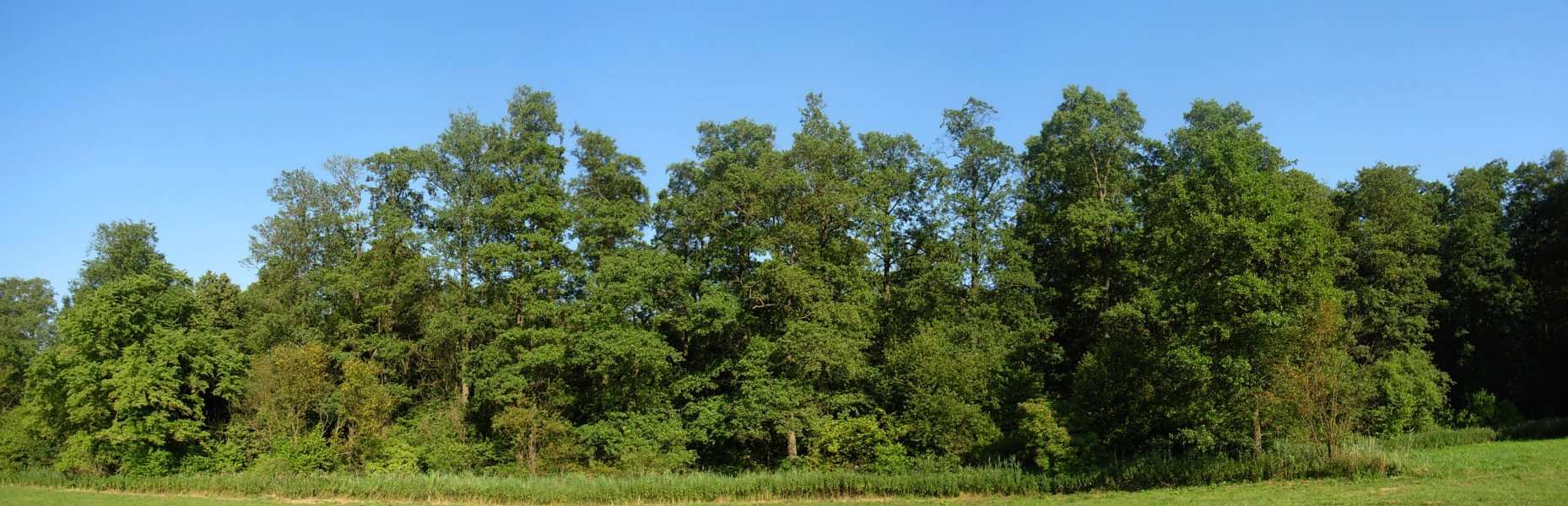 Rezerwat przyrody Ostrów k. Pszczółczyna